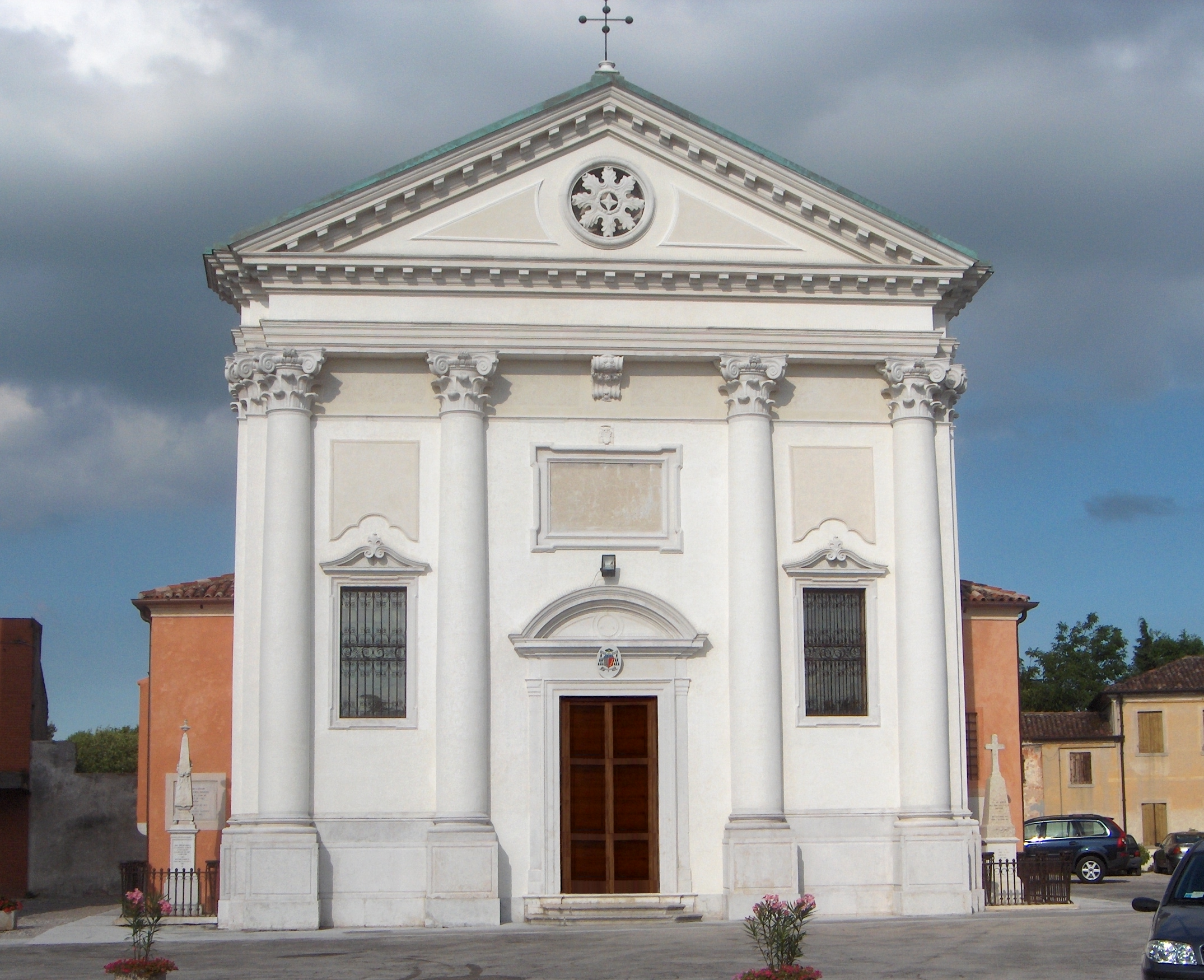 Chiesa di Ognissanti, Roncade, Treviso, Italy